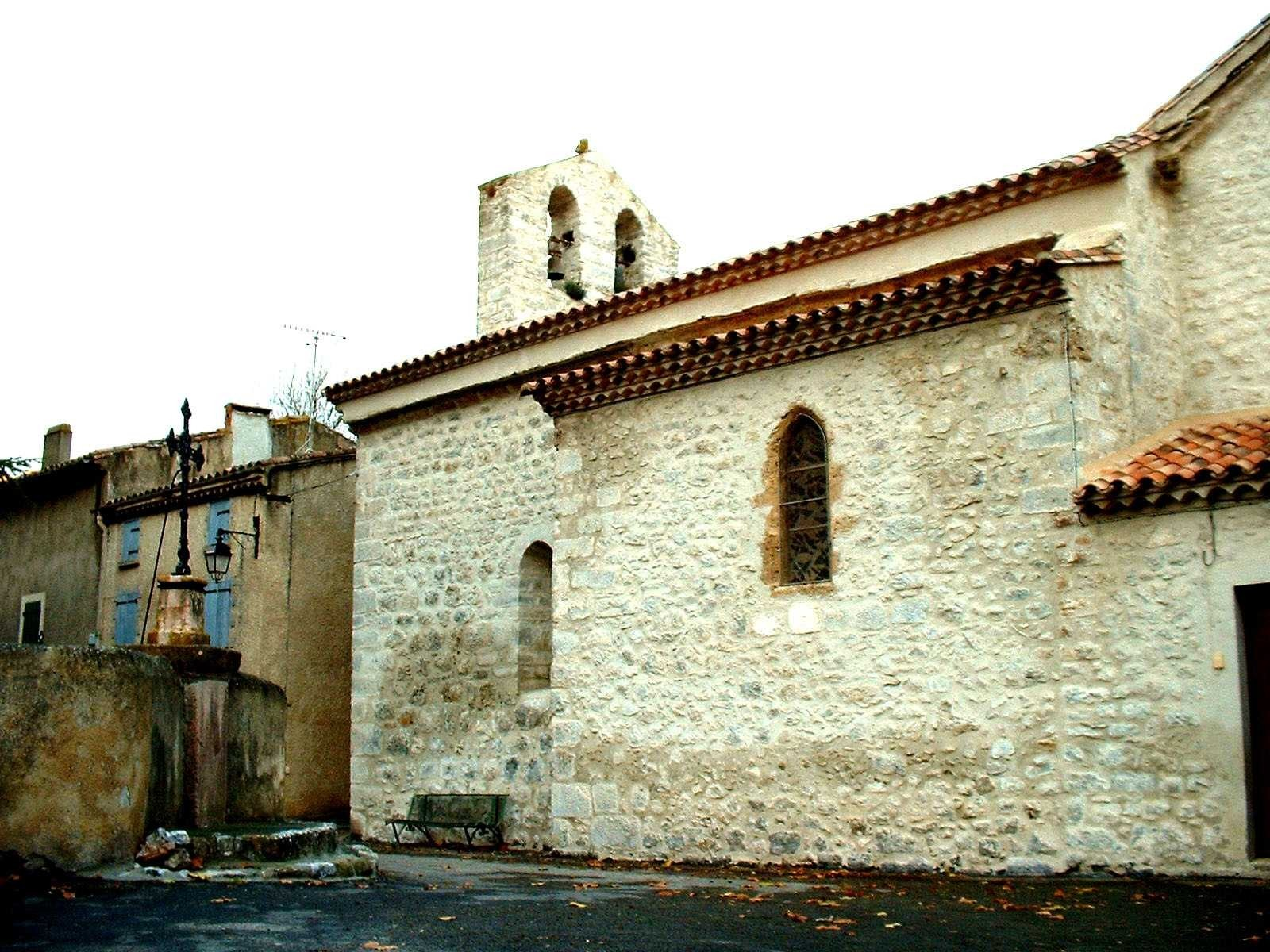 Laroque-de-Fa (France) - Eglise